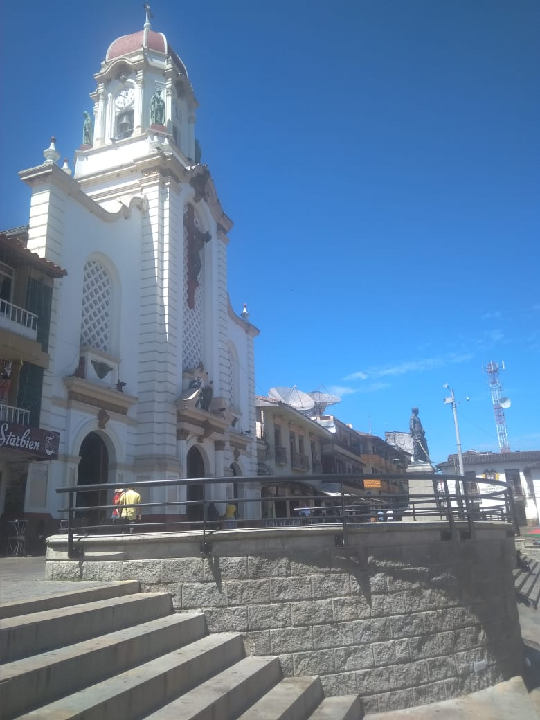 Atrio del Municipio de